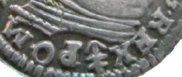 Herb podskarbiego litewskiego Lwa Sapiehy na trojaku litewskim Stefana Batorego z 1585 r.